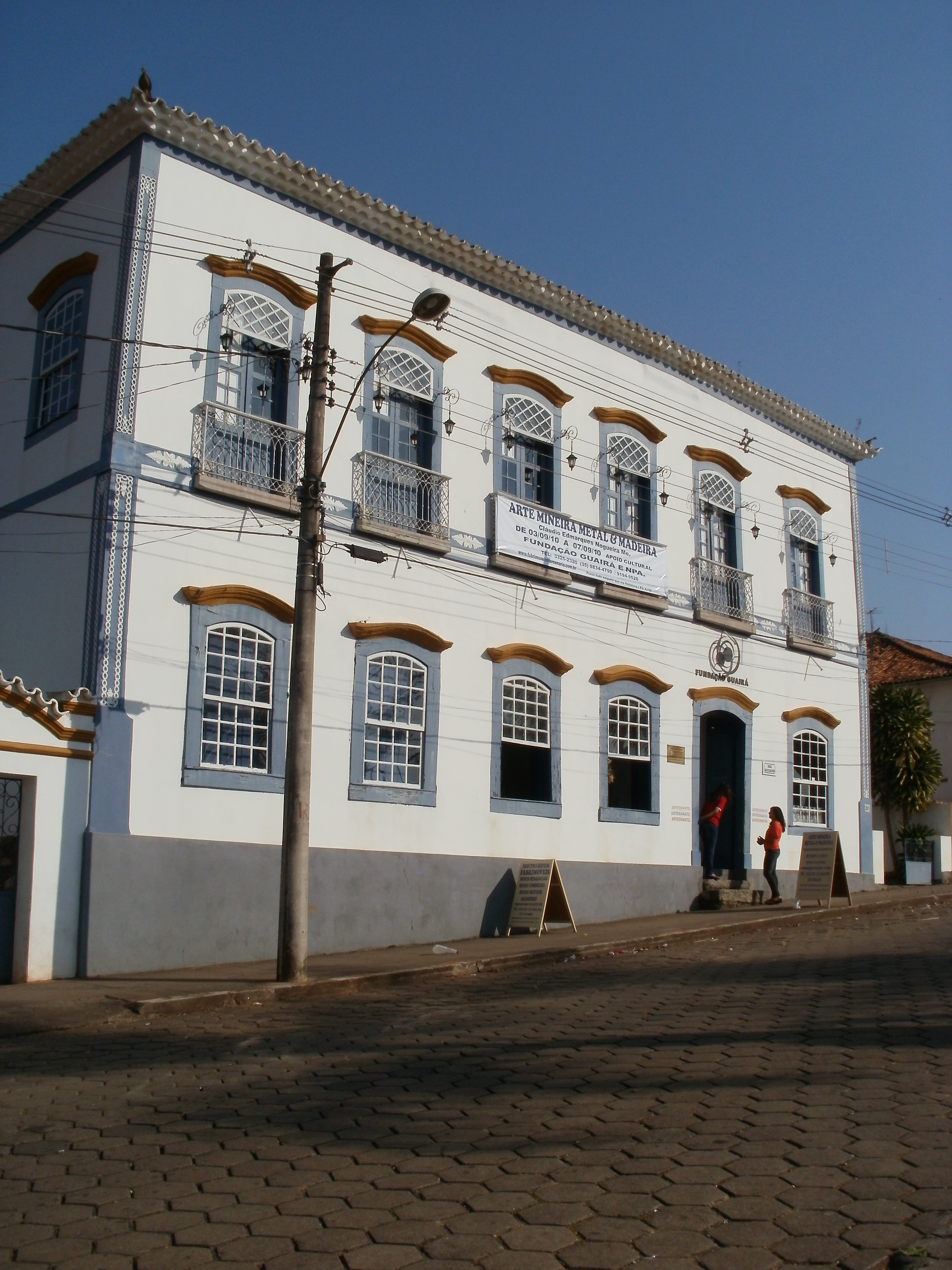 Fundação Guairá, casa de artefatos artesanais. Situado no centro de Andrelândia.